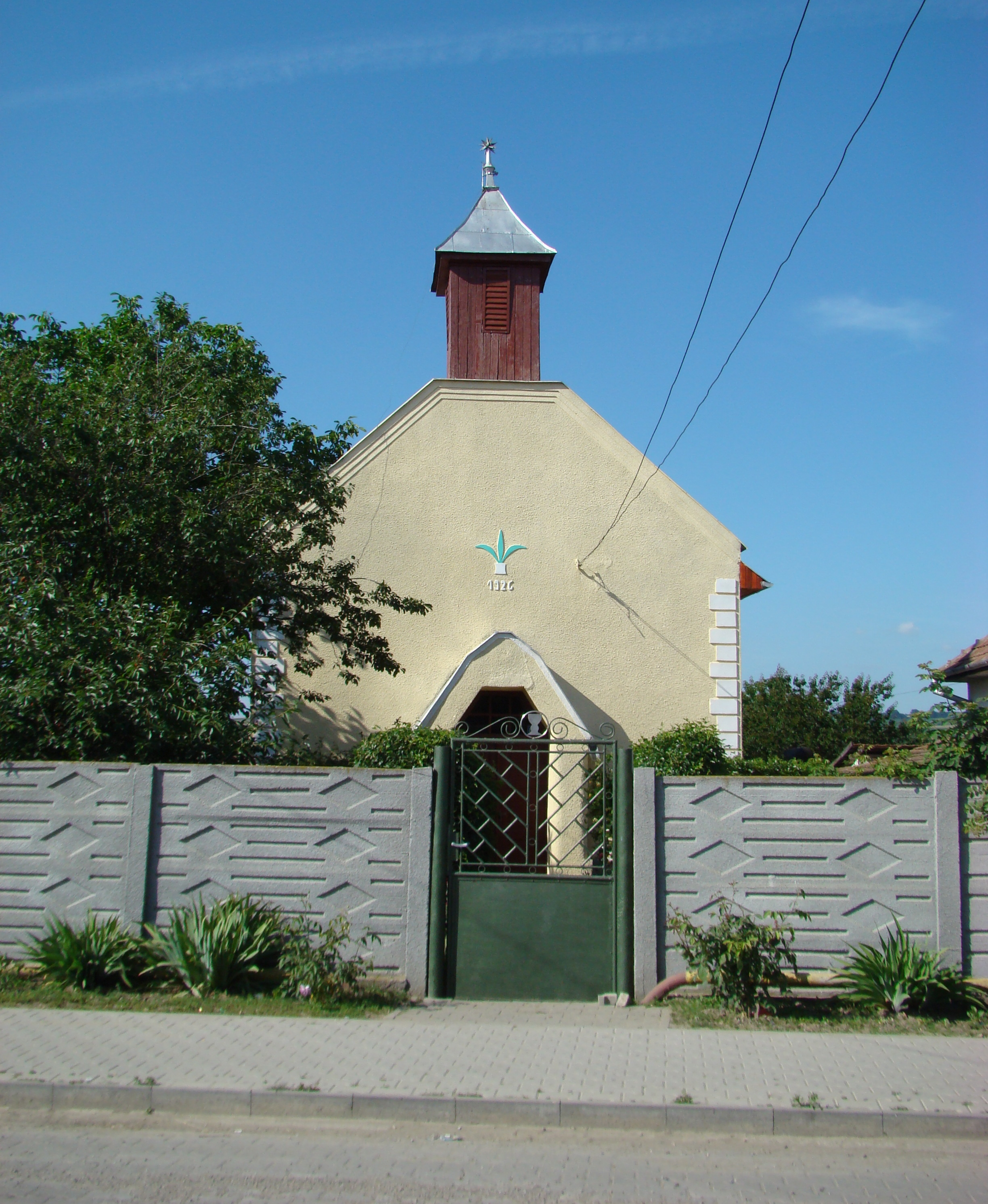 Biserica reformată din Crăciunelu de Jos